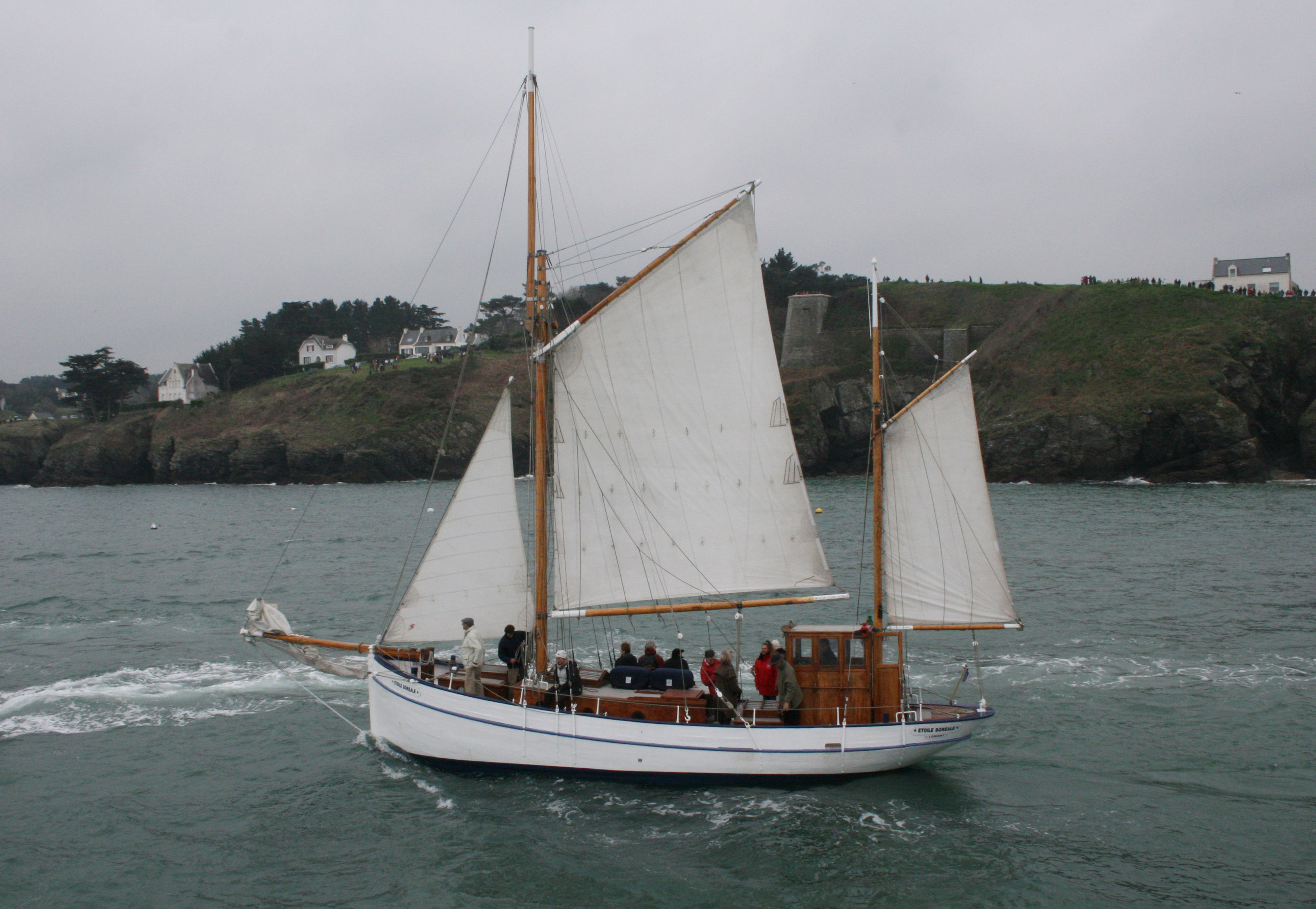 Etoile boreale